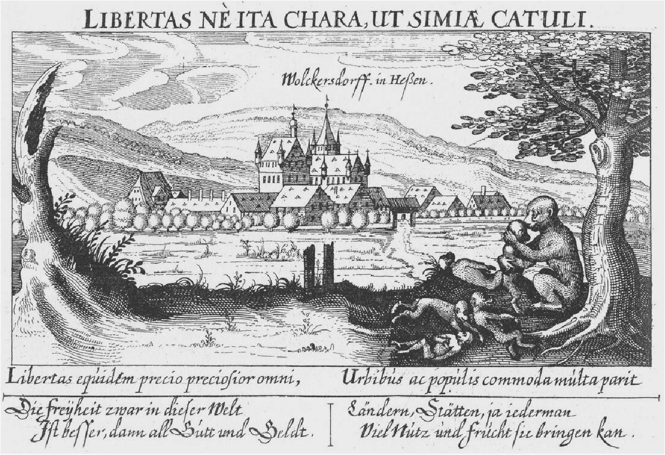 Ansicht von vor 1625 Schloss Wolckersdorff in Heßen (Schloss Wolkersdorf, Hessen), abgegangen (1811 bis 1813 auf Abbruch versteigert); leicht verschiedene Darstellung je nach Ausgabe 1624 oder 1625,; dies entspricht der Ausgabe von 1625